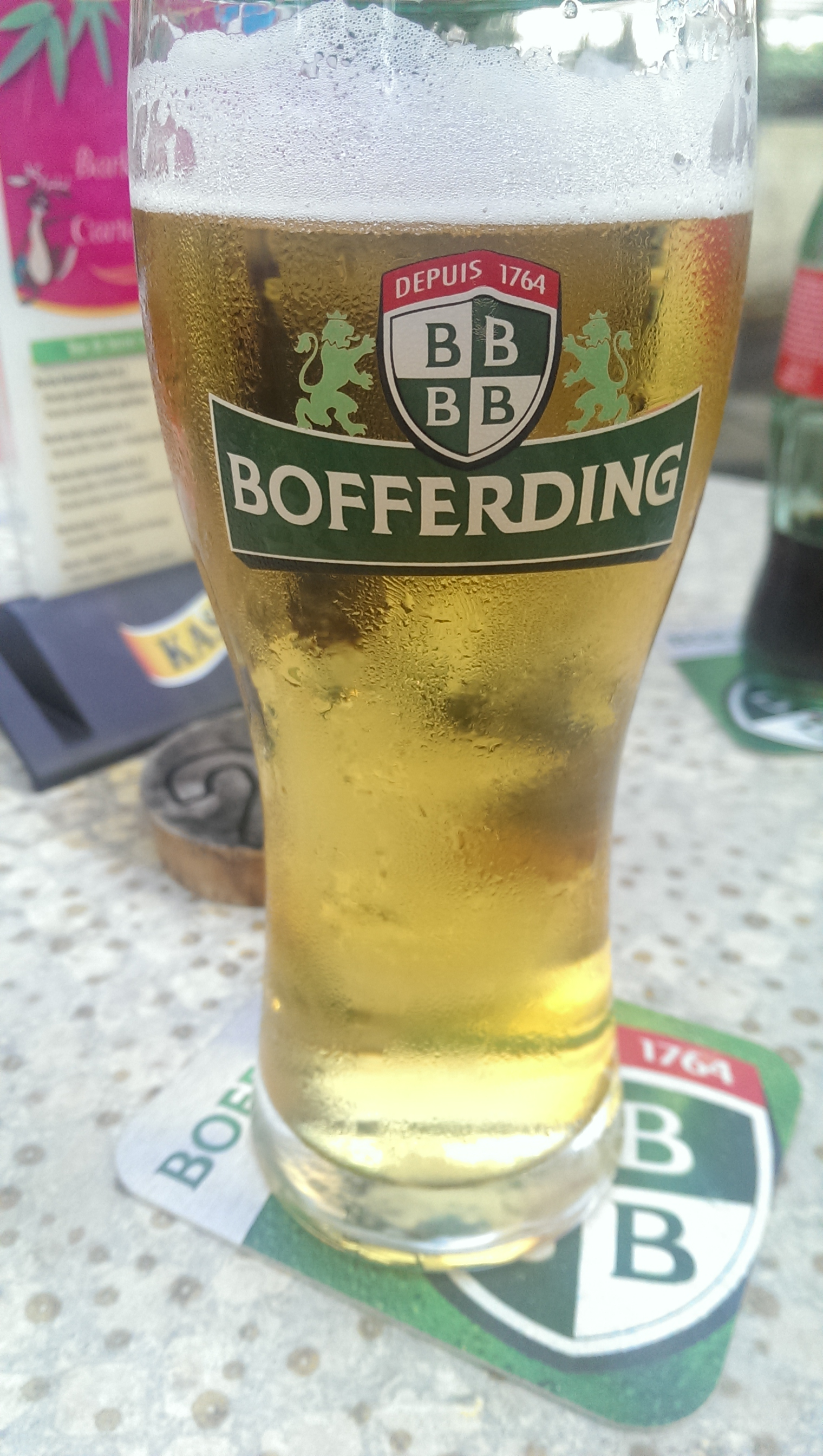 Een gevuld Bofferding-glas.